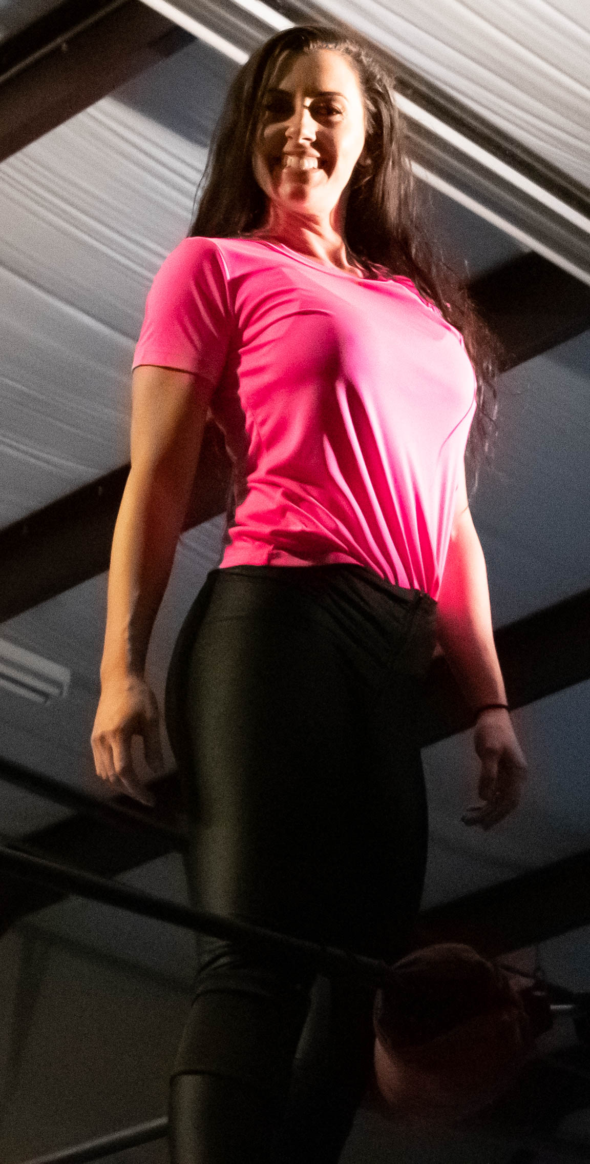 Santan Garrett en 2019.